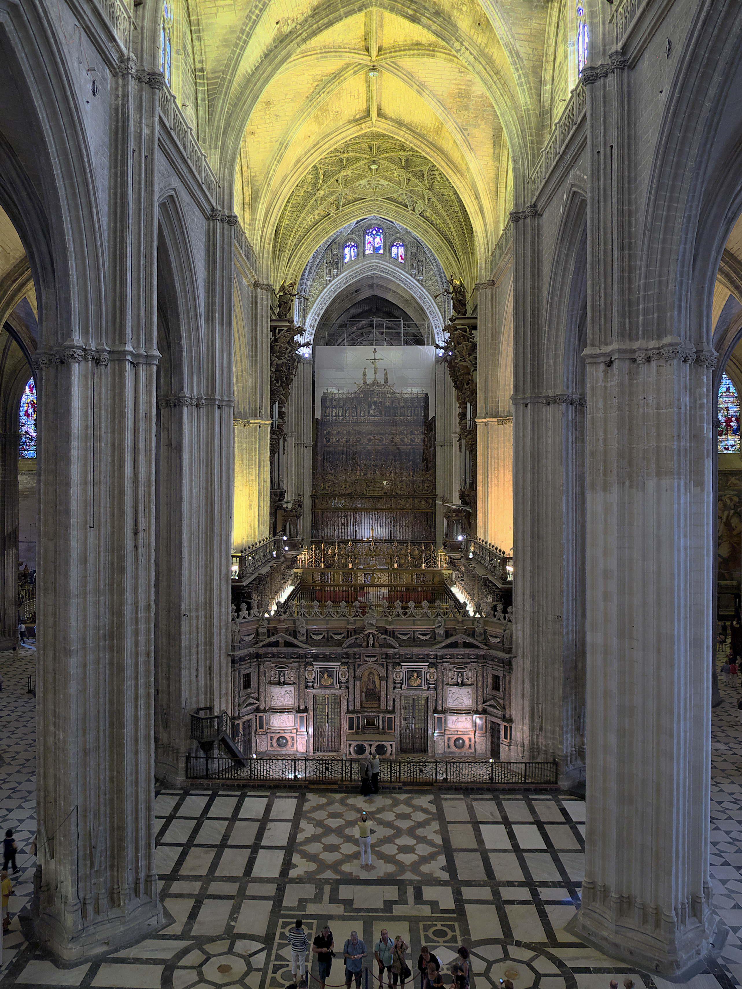 Juan II de Castilla jamás confió en la viabilidad del magno proyecto de construir el mayor templo gótico de la humanidad en Sevilla.